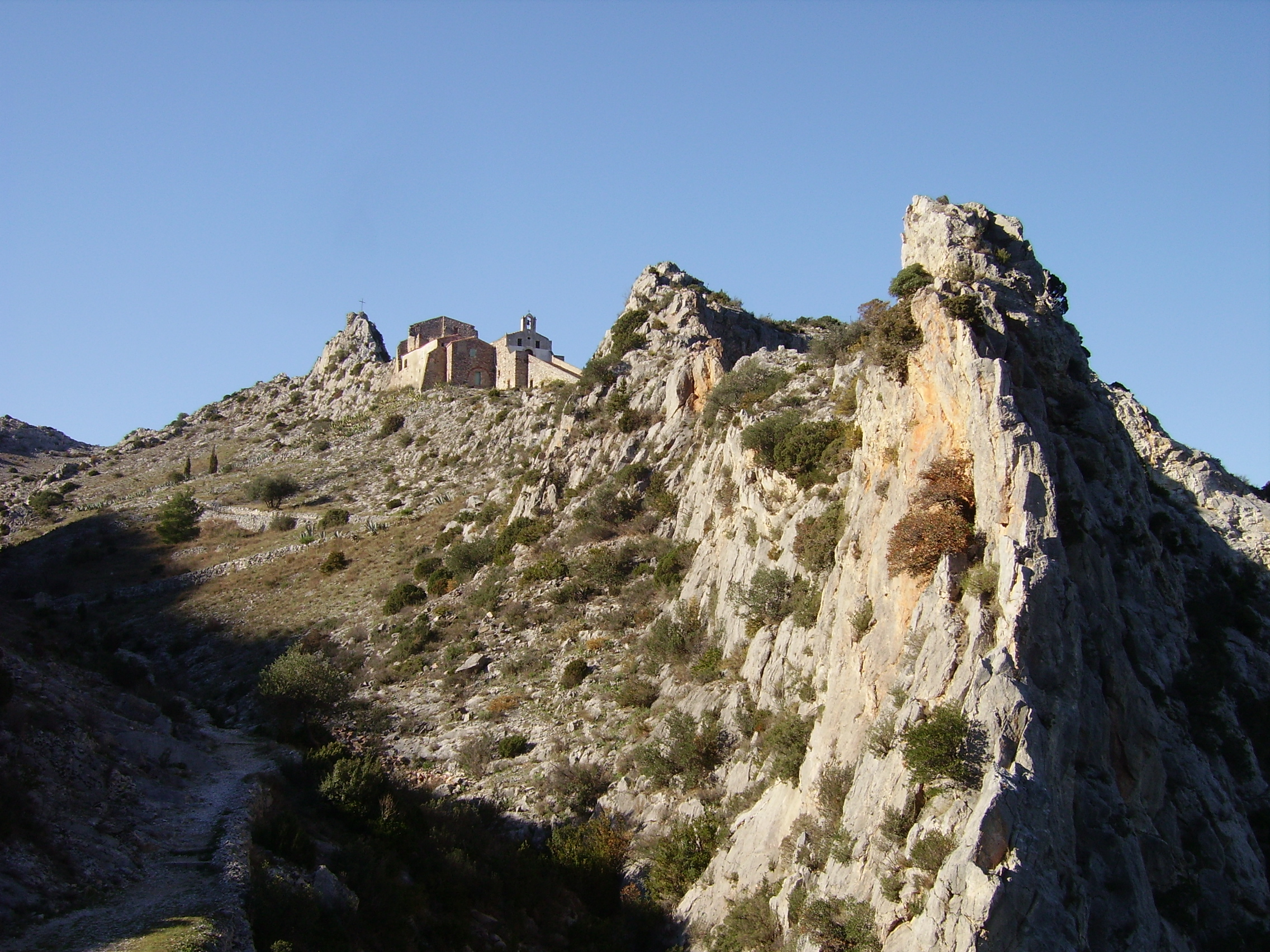 Ermitage de Cases de Pène